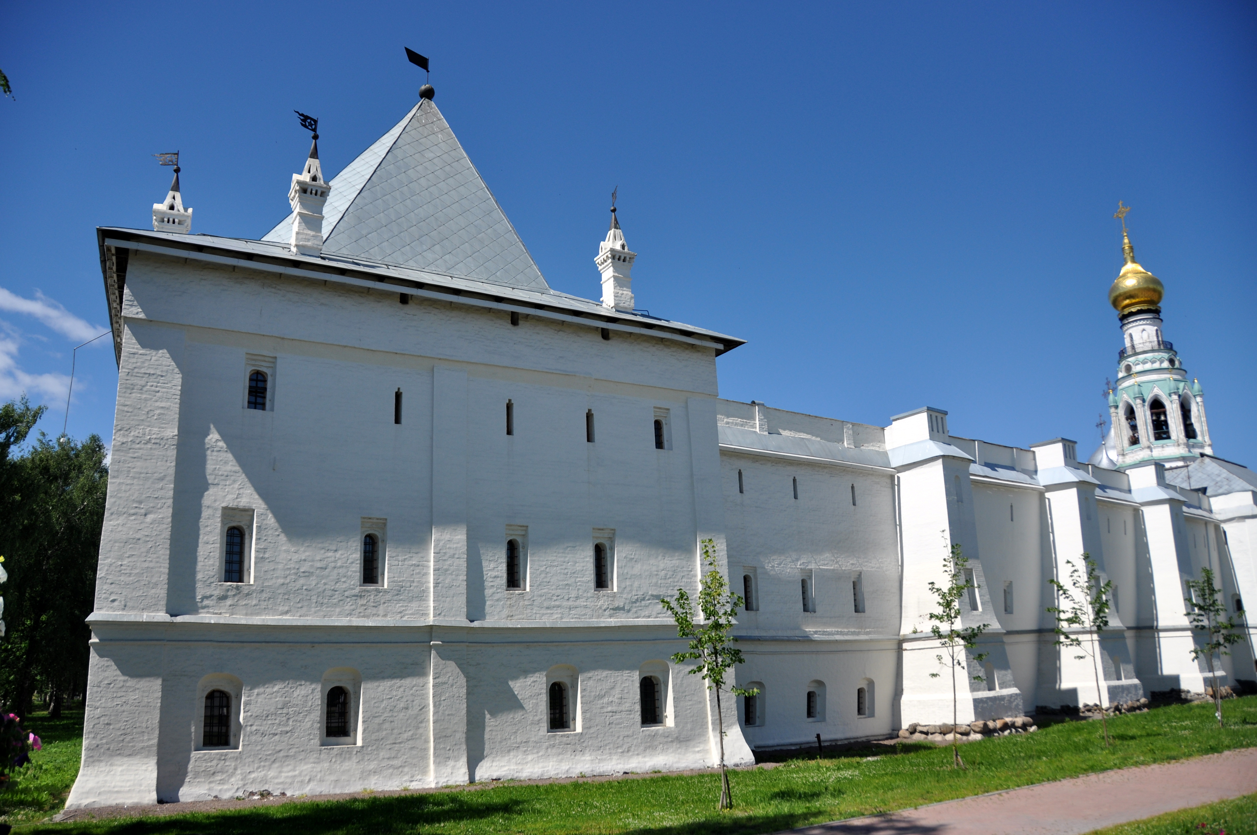 Юго-западная башня Архиерейского двора в Вологде